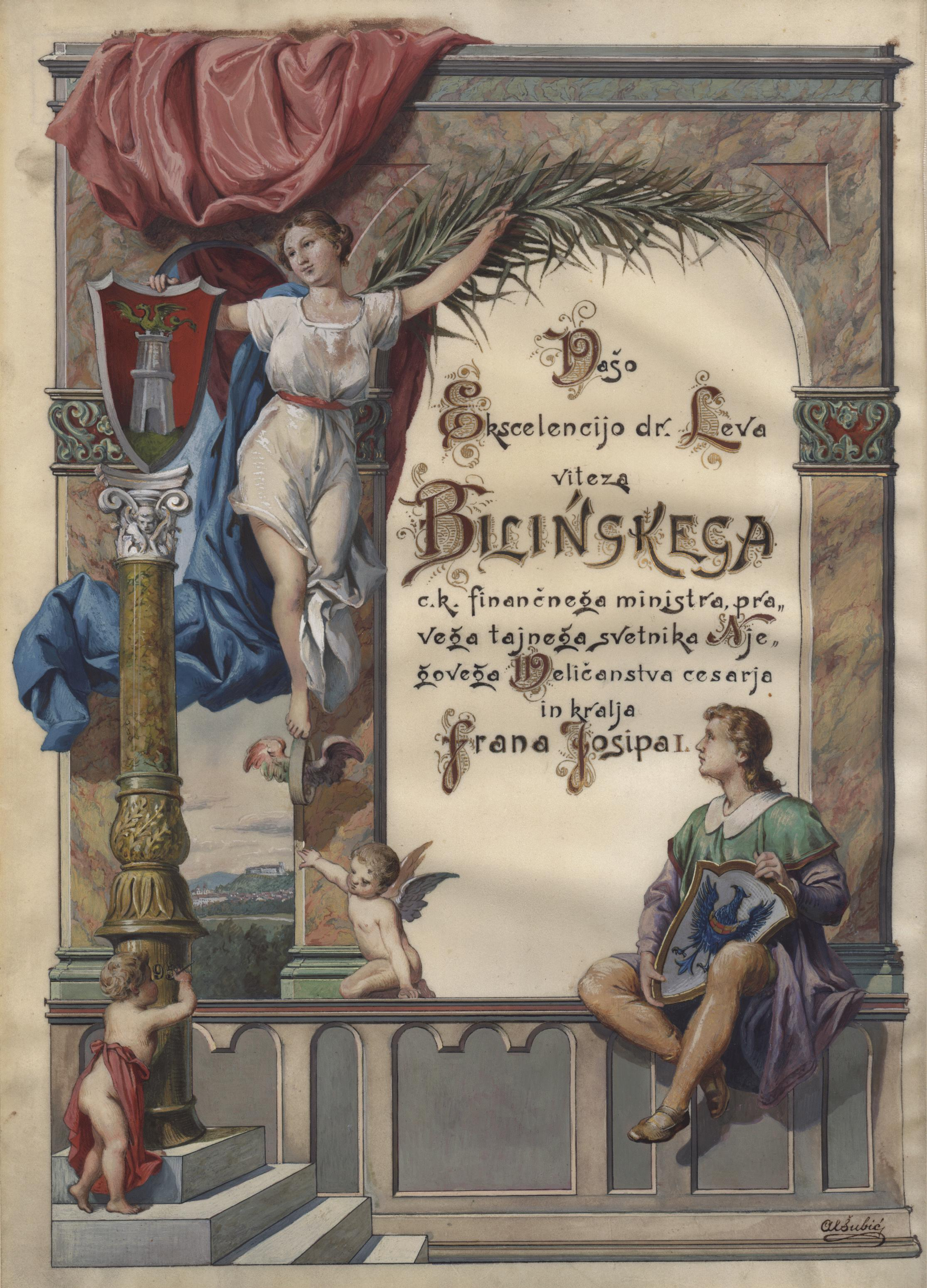 Občinski svet mesta Ljubljane podeljuje ministru dr. Levu Bilinjskemu častno meščanstvo za zasluge za Ljubljano po potresu 1895.